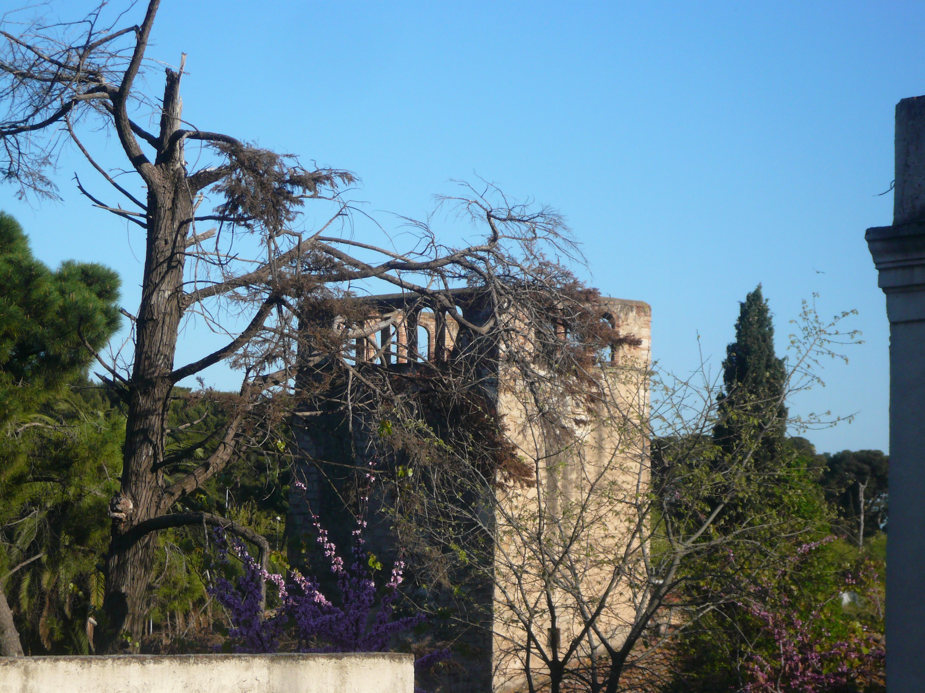 Can Clota (Esplugues de Llobregat) Object location41° 22′ 34.86″ N, 2° 05′ 39.54″ E